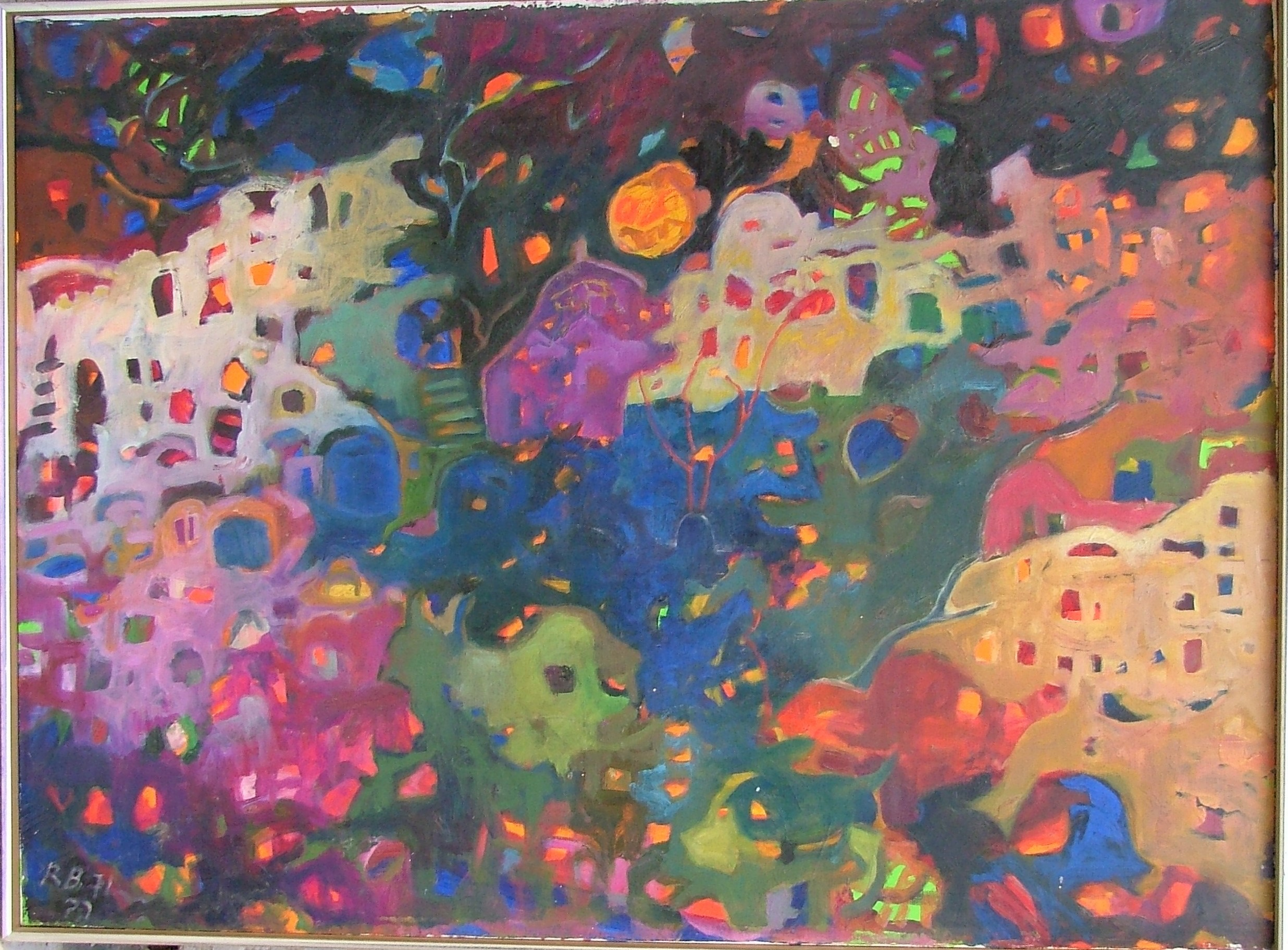 נוף עירוני